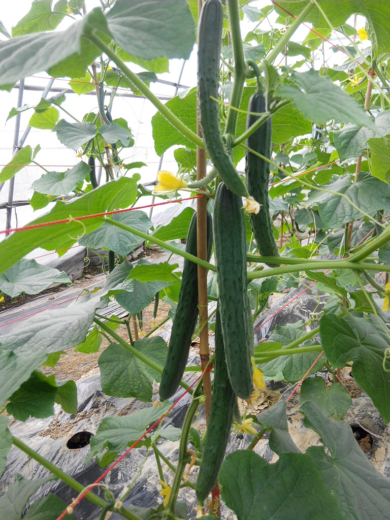 大量结果的黄瓜